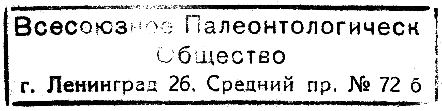 Всесоюзное Палеонтологическое общество - печать и адрес